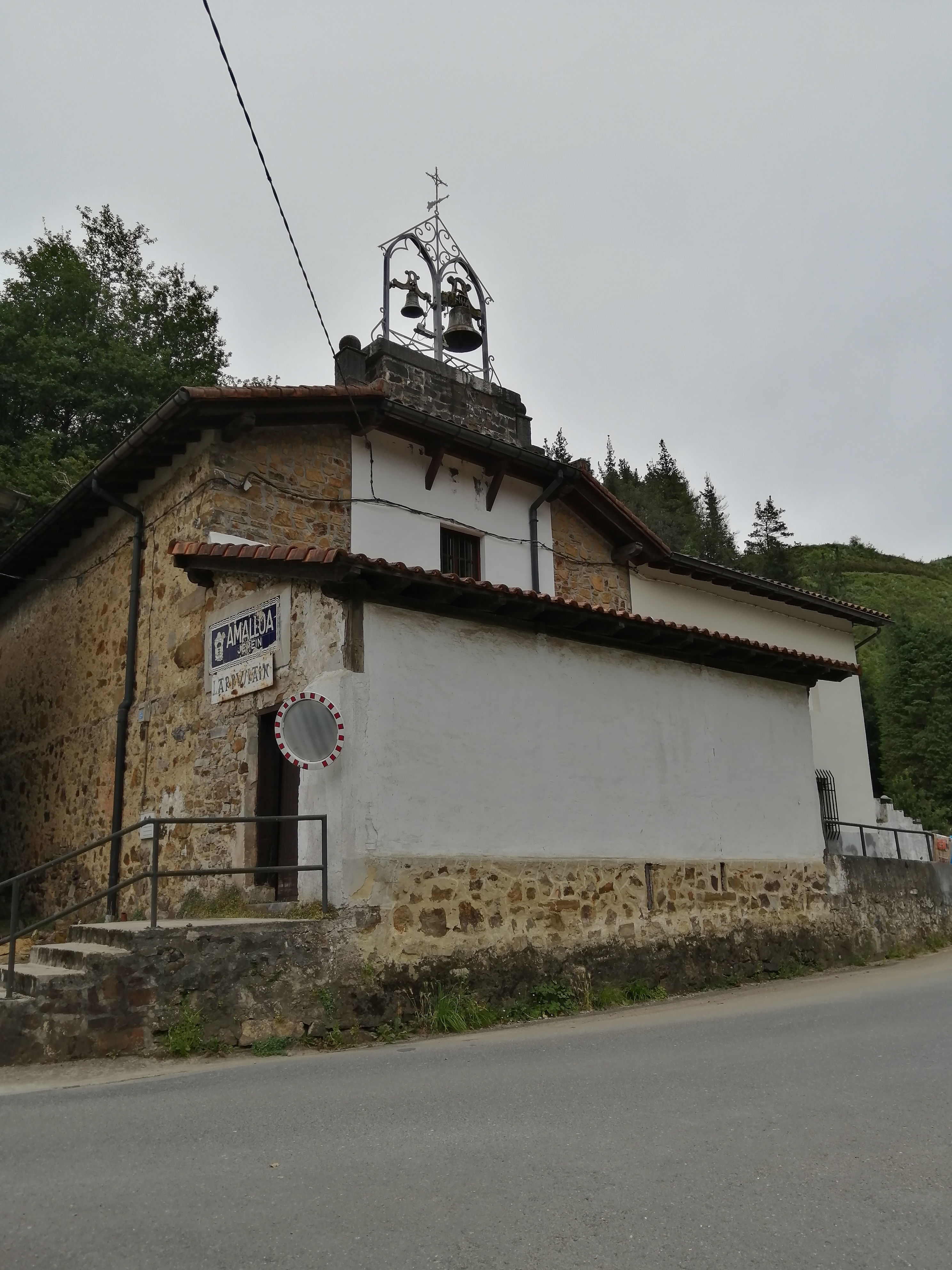 San Inazio eliza, Larruskain, Markina-Xemein